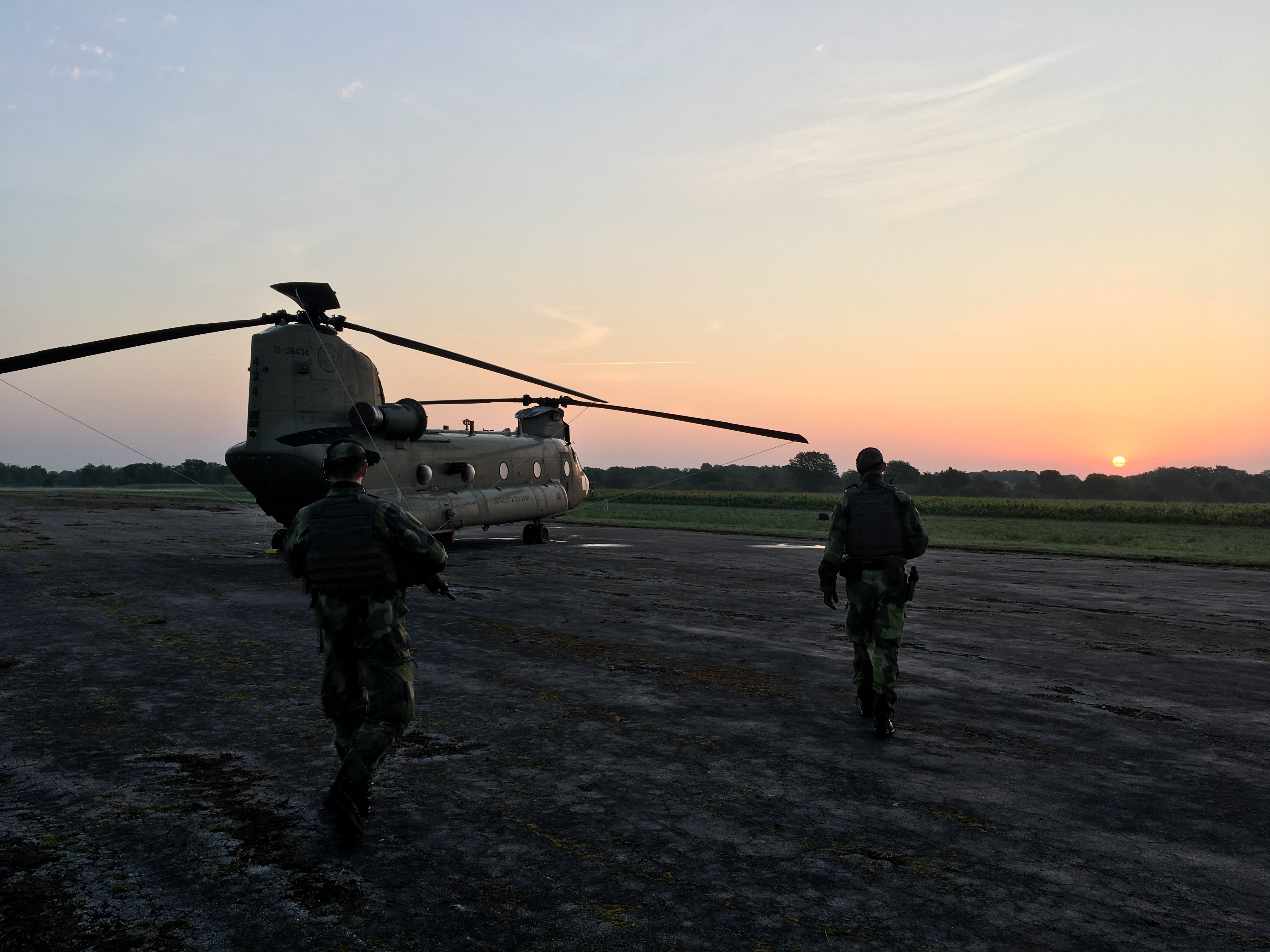 Soldater ur 1614.strilförsvarskompaniet skyddar amerikanska transporthelikoptrar av typen CH-47 Chinook under Försvarsmaktsövning 17 på Bunge flygfält, Gotland.